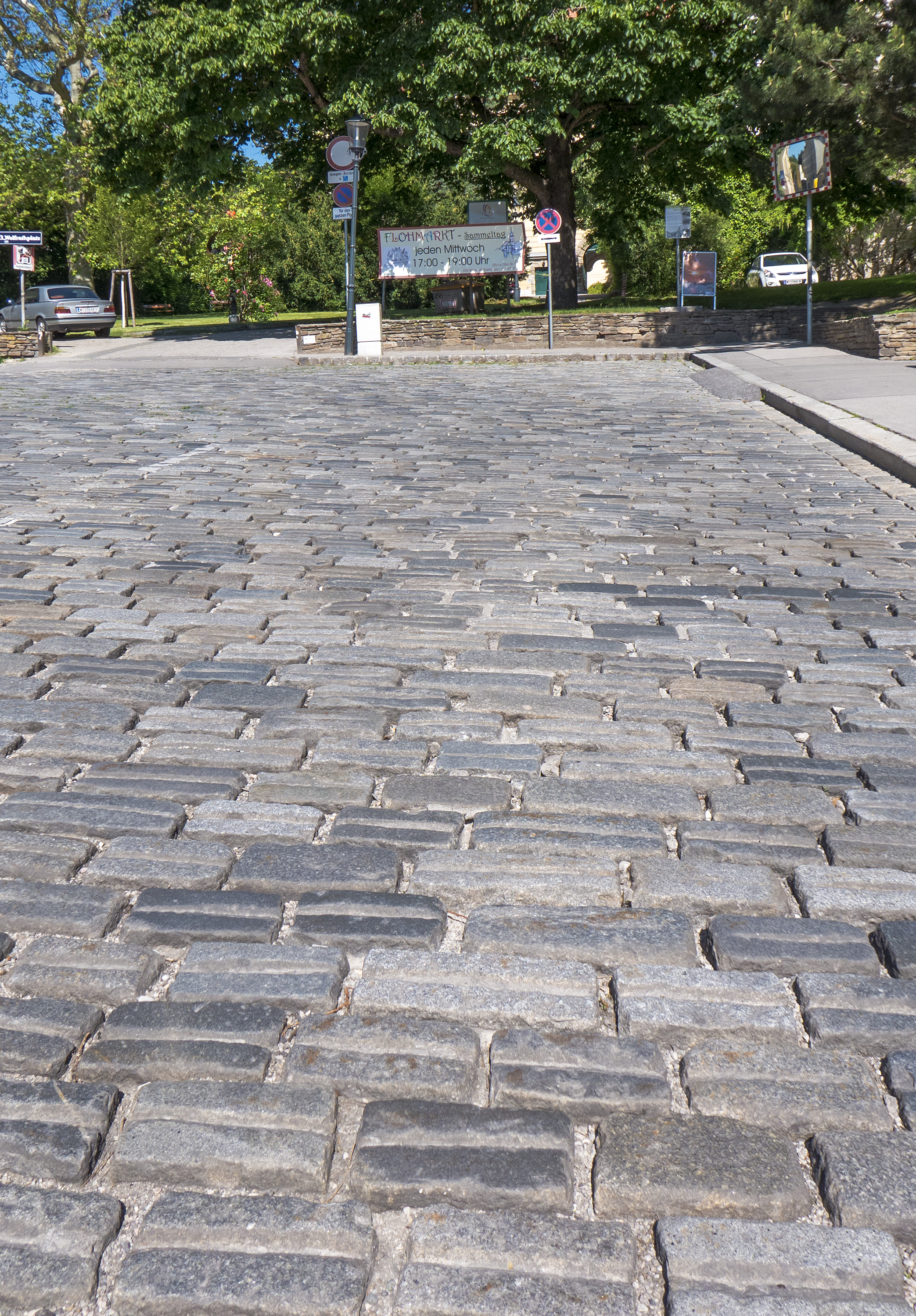 "Geritzte" Pflastersteine bei Wien 13 Wolfrathplatz 4 Richtung Nordwesten